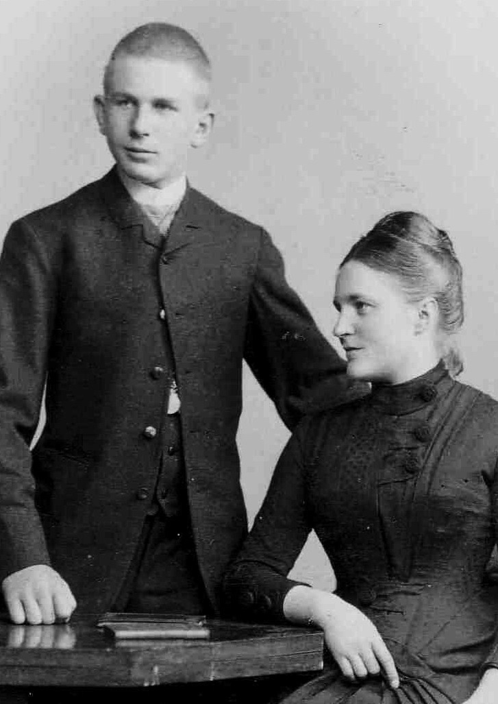 Ludwig Meyländer genannt Rogalla von Bieberstein (1873-1940) mit Ehefrau Hanna Woelki (um 1914)